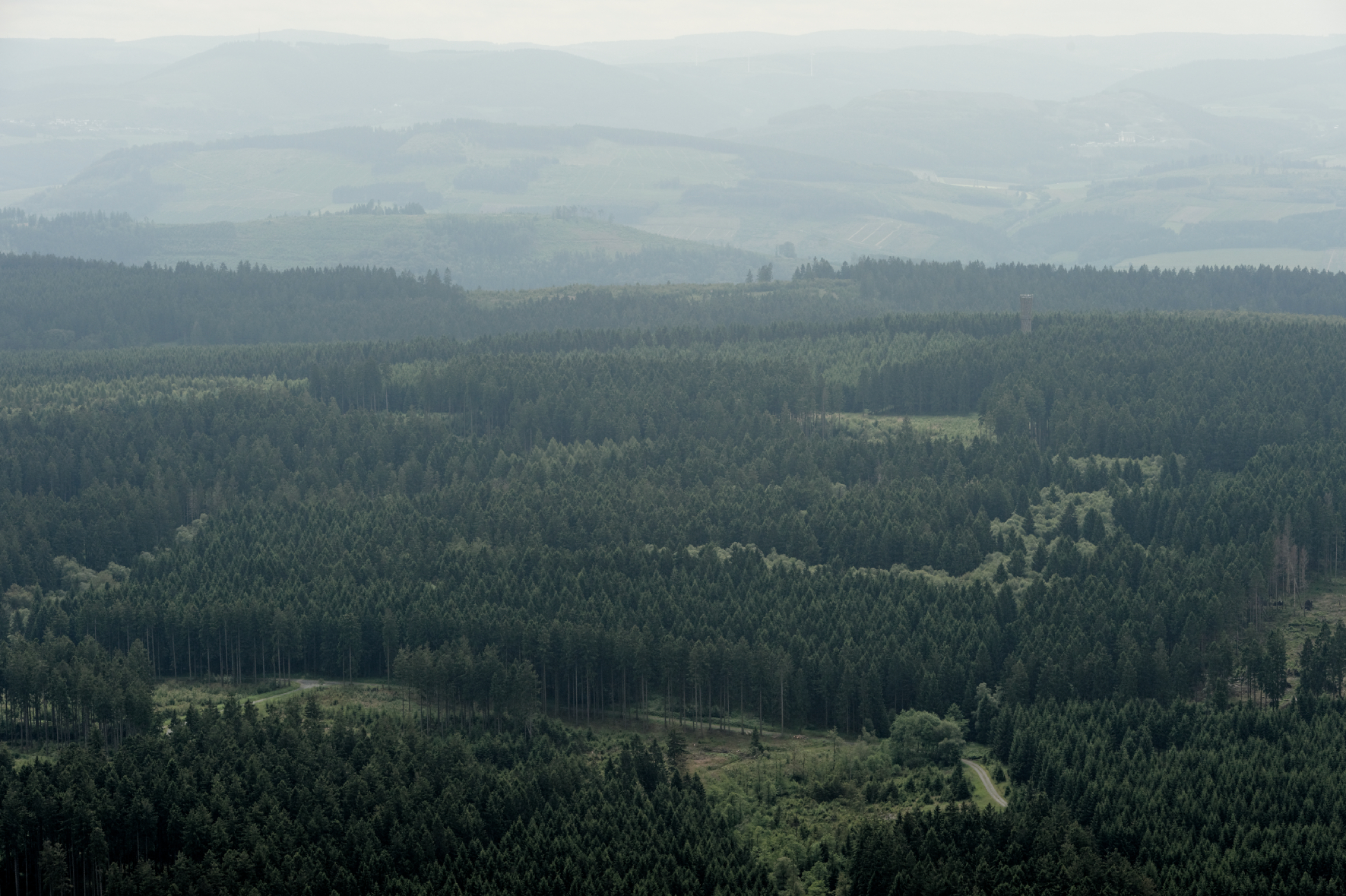 Fotoflug Sauerland-Nord. Blick in Richtung Süd über den Warsteiner Wald mit dem Lörmecke-Turm, die Hubertusquelle und den Plackweg, Standort über dem Rückenberg. The making of this document was supported by the Community-Budget of Wikimedia Germany.